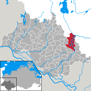 Neustadt-Glewe in Mecklenburg-Vorpommern - district Ludwigslust